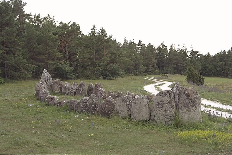 Skeppssättning Motiv: Djupvik Kategori: Stenkrets/domarring/skeppssättning Skeppssättning.